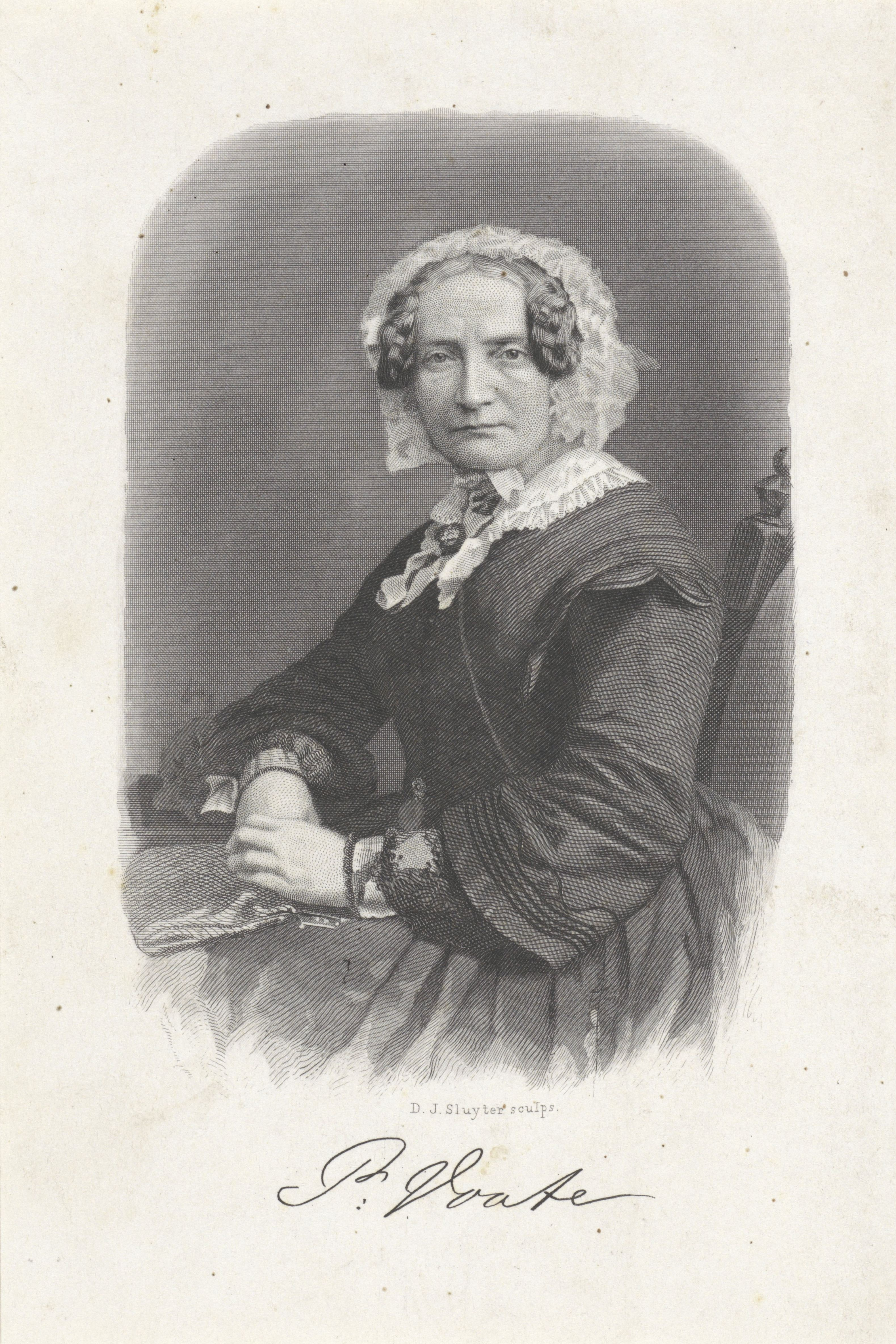 IdentificatieTitel(s): Portret van Petronella VoûteObjecttype: prent Objectnummer: RP-P-1909-601Opschriften / Merken: verzamelaarsmerk, verso midden, gestempeld: Lugt 2228Omschrijving: Portret van Petronella Voûte, directrice van Asyl Steenbeek, het eerste opvangtehuis voor prostituees. Zij draagt een kanten muts en kraag en zit op een stoel, haar elleboog steunend op een tafel. Op haar schoot houdt zijn een beugeltasje vast. Onder het portret haar handtekening.VervaardigingVervaardiger: prentmaker: Dirk Jurriaan Sluyter (vermeld op object)Plaats vervaardiging: AmsterdamDatering: 1845 - 1886Fysieke kenmerken: staalgravure, ets, stippelgravure en rouletteMateriaal: papier Techniek: staalgravure / etsen / stippelgravure / rouletteAfmetingen: plaatrand: h 171 mm × b 114 mmOnderwerpWat: head-gear: cap (+ lace used for clothes)bag (HANDBAG) (+ women's clothes)Wie: Petronella VoûteVerwerving en rechtenCredit line: Schenking van de heer H.P. Gerritsen, Den HaagVerwerving: schenking 1909Copyright: Publiek domein